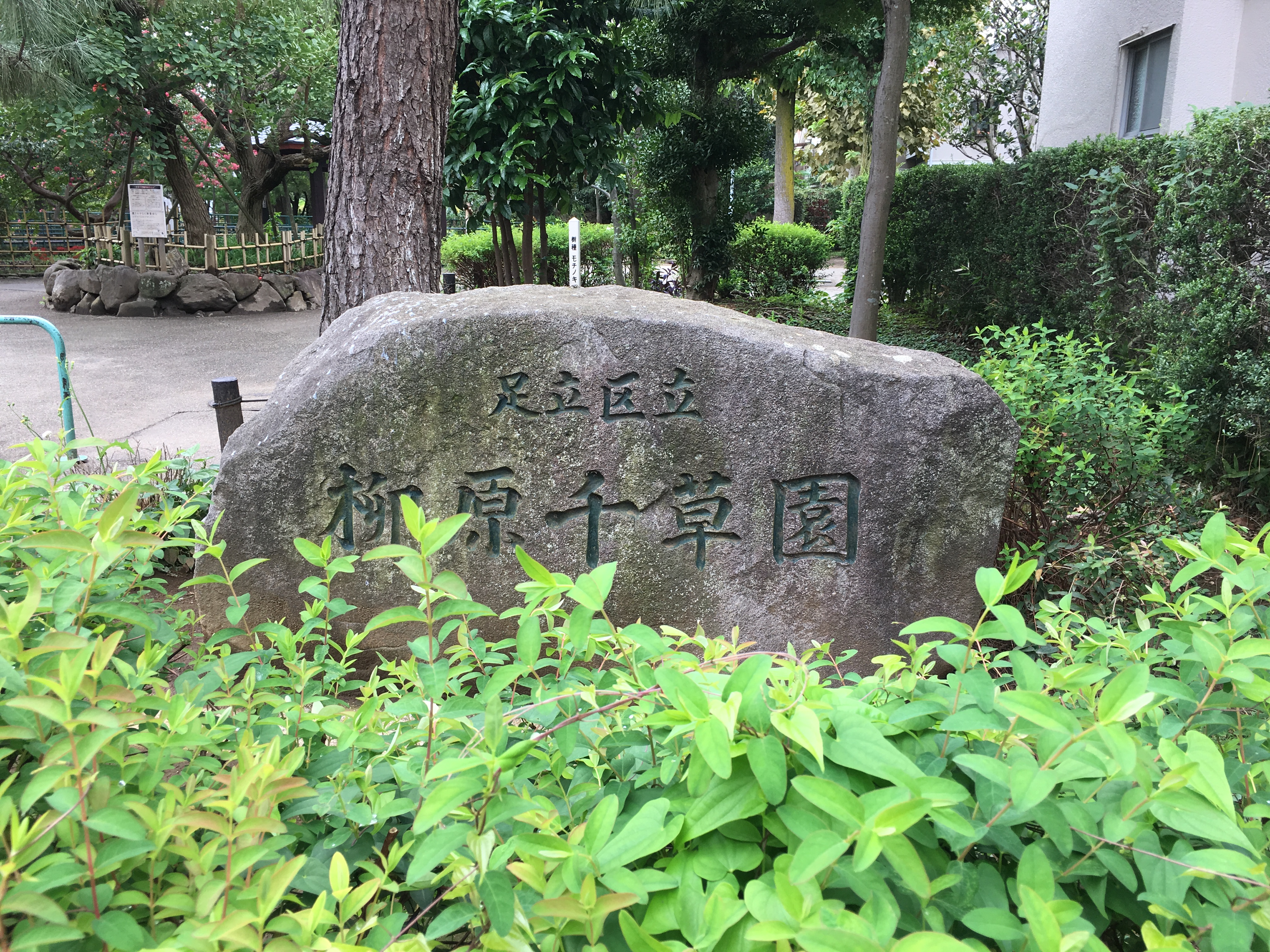 柳原千草園の入り口にある石碑